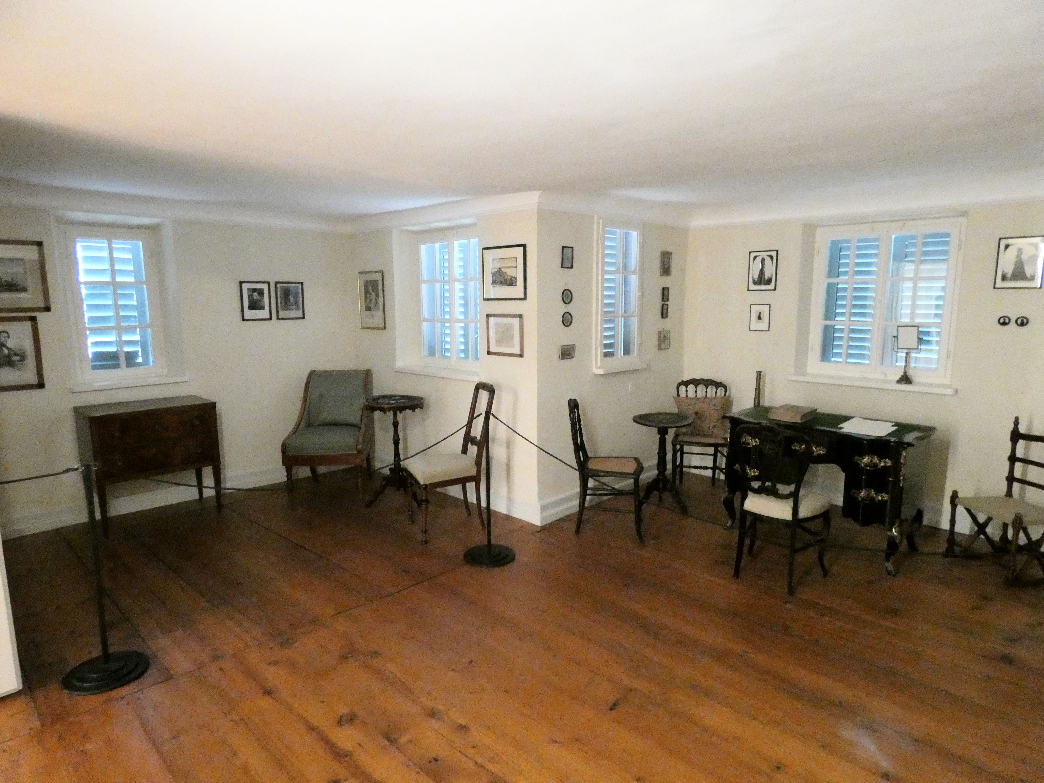 Inneneinrichtung des Fürstenhäusle (1. Stock) von Annette von Droste-Hülshoff, Meersburg